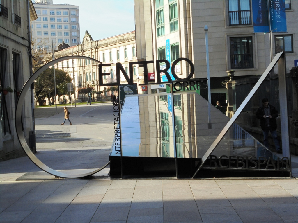 Museo CITA en Pontevedra capital